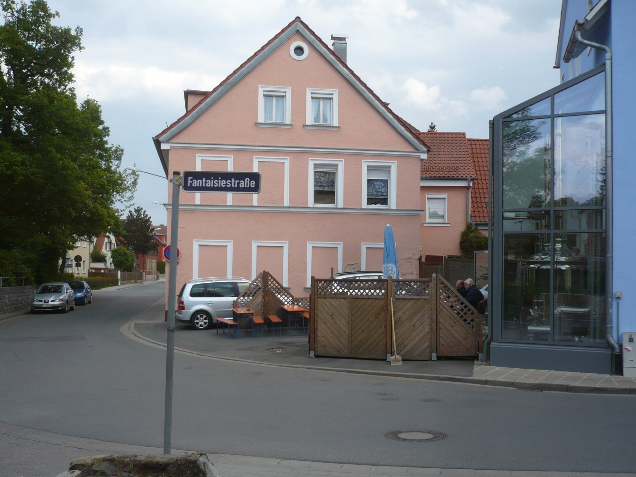 St.-Nikolausstraße Ecke Fantaisiestraße in Bayreuth